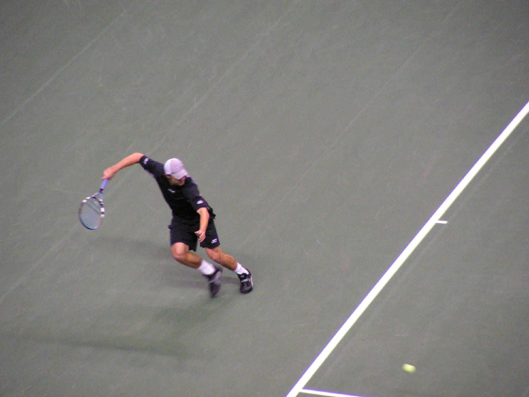 Andy Roddick o prientiñ un taol-eeun.